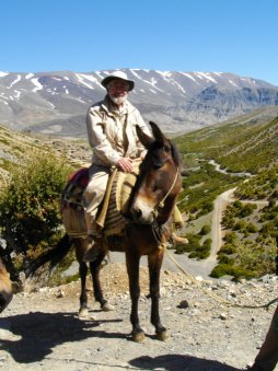 L'entomologiste français Yves Gomy en mai 2009 à Tamjilt, dans le Moyen Atlas, lors de sa mission scientifique au Maroc.